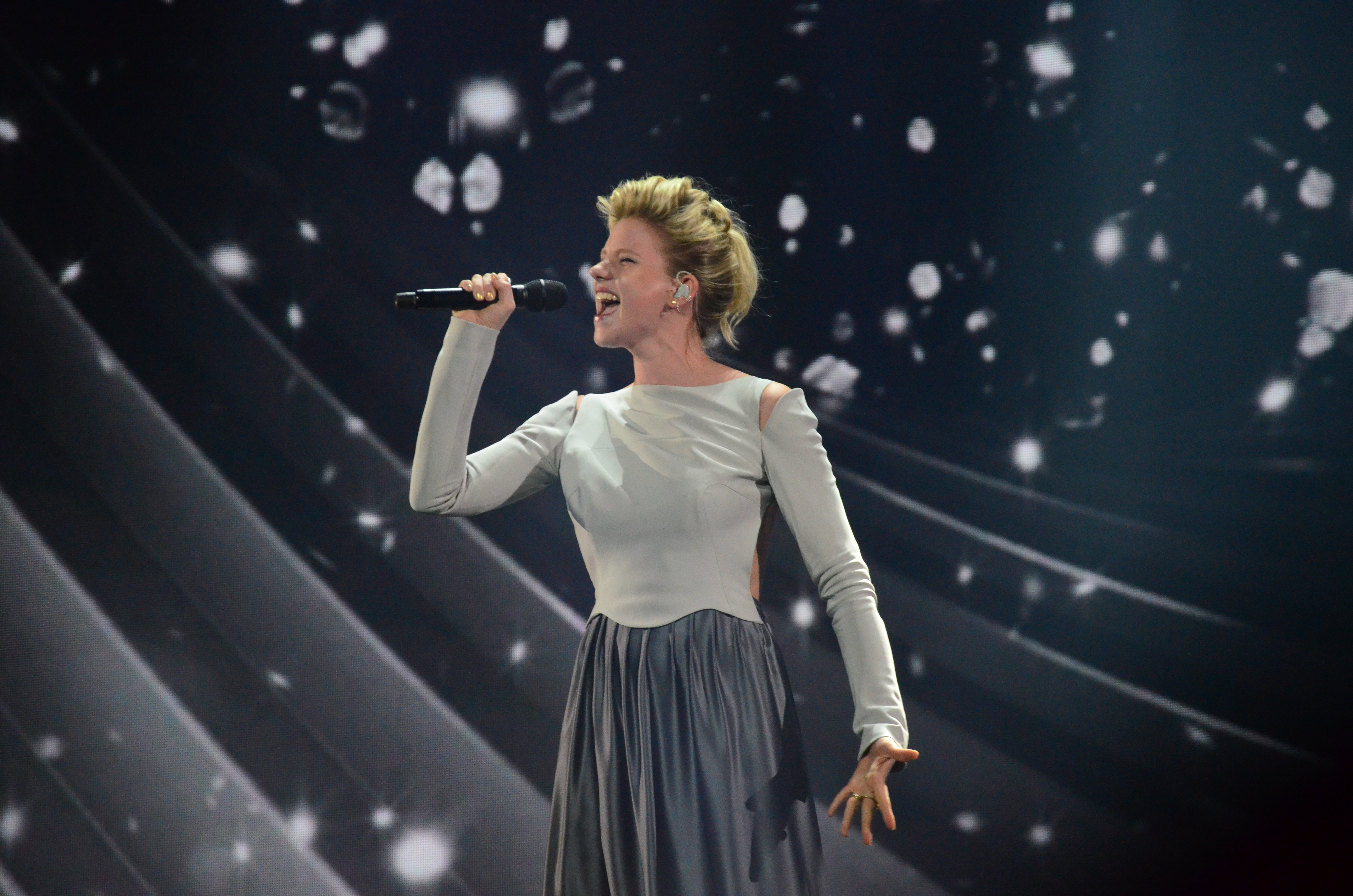 12 травня. Генеральна репетиція фіналу Євробачення 2017. Levina (Germany).